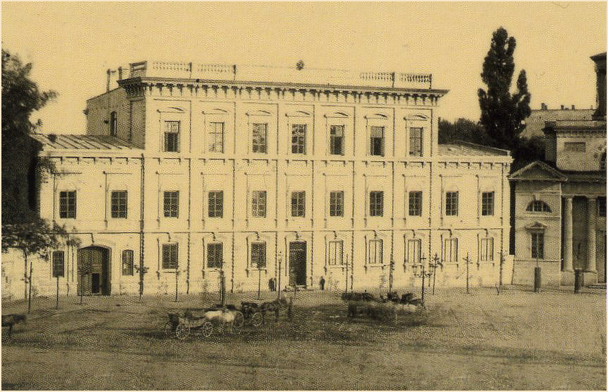 Budynek Łódzkiej Wyższej Szkoły Rzemieślniczej po przebudowie w 1884r. Lokalizacja: Rynek Nowego Miasta, po prawej stronie szkoły widoczny Kościół Ewangelicki pod wezwaniem Świętej Trójcy, jeszcze przed przebudową.